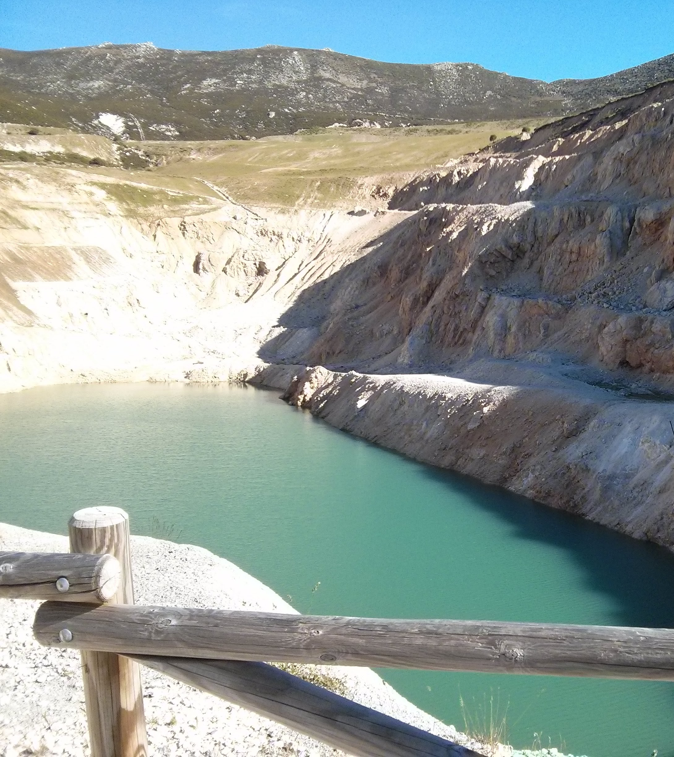 Huella de explotación de la mina a cielo abierto de Respina